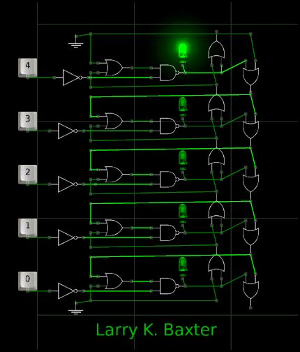 Снимок модели 5-ти битного триггера Larry K. Baxter'а из US Patent 3,764,919 Oct. 9, 1973 Filed: Dec. 22, 1972 Fig.3